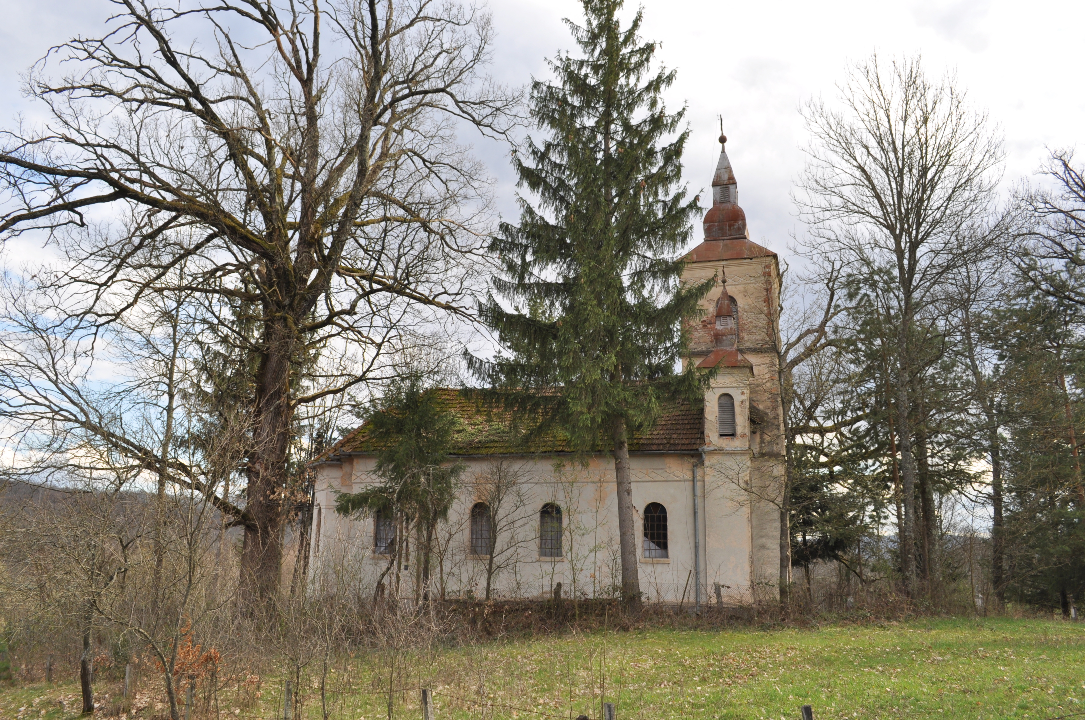 Biserica "Sfinții Arhangheli" , sat LEAUŢ; comuna TOMEŞTI, județul Hunedoara